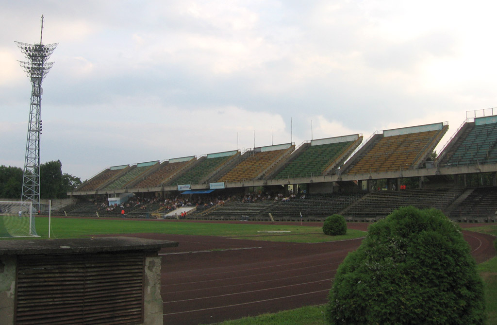 Zachodnia trybuna stadionu Stali Mielec, znajdująca się od strony ul. Kusocińskiego.